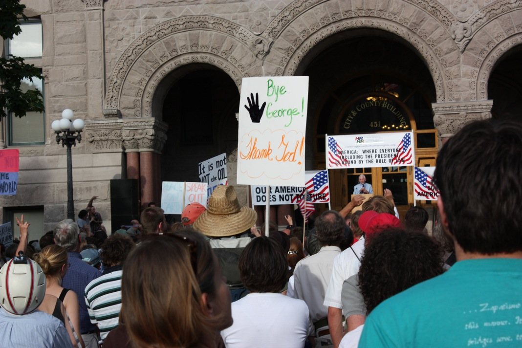 Daniel Ellsberg Speaking